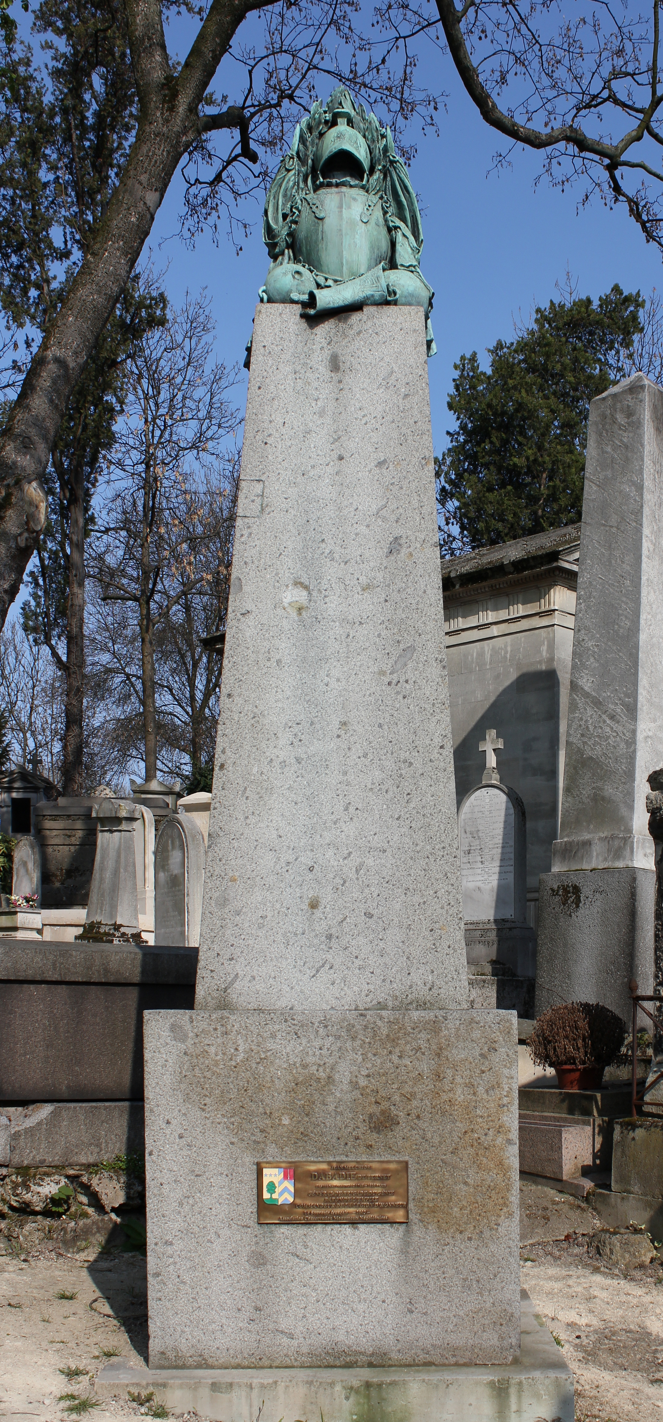 Obélisque surmontée de différents attributs militaires (cuirasse, casque...).vue d'ensemble